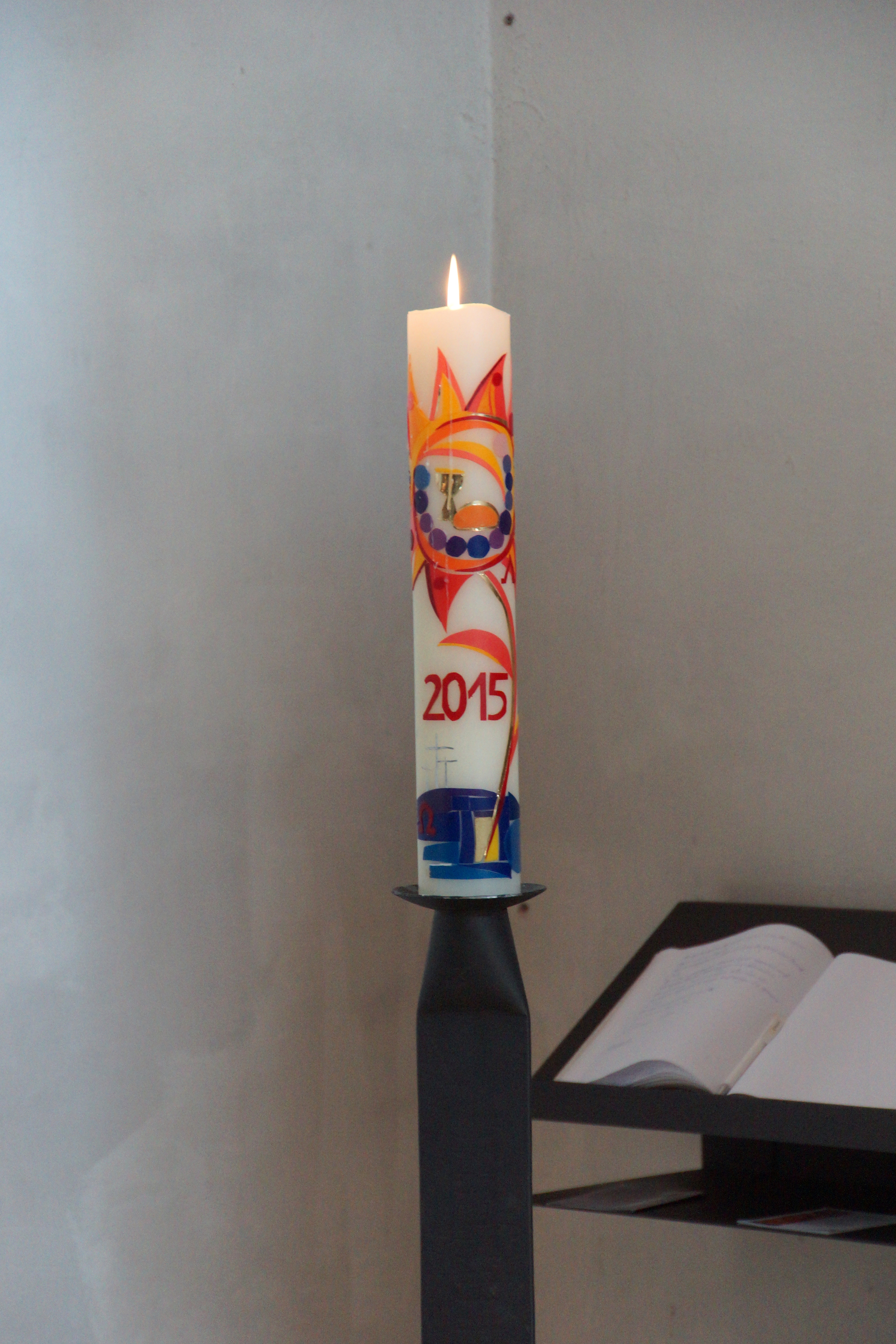 Neumarkter Christuskirche